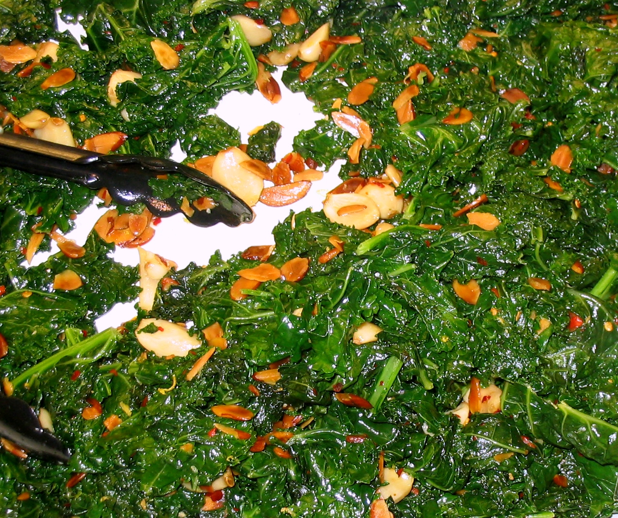 Steamed Kale and slivered almonds.